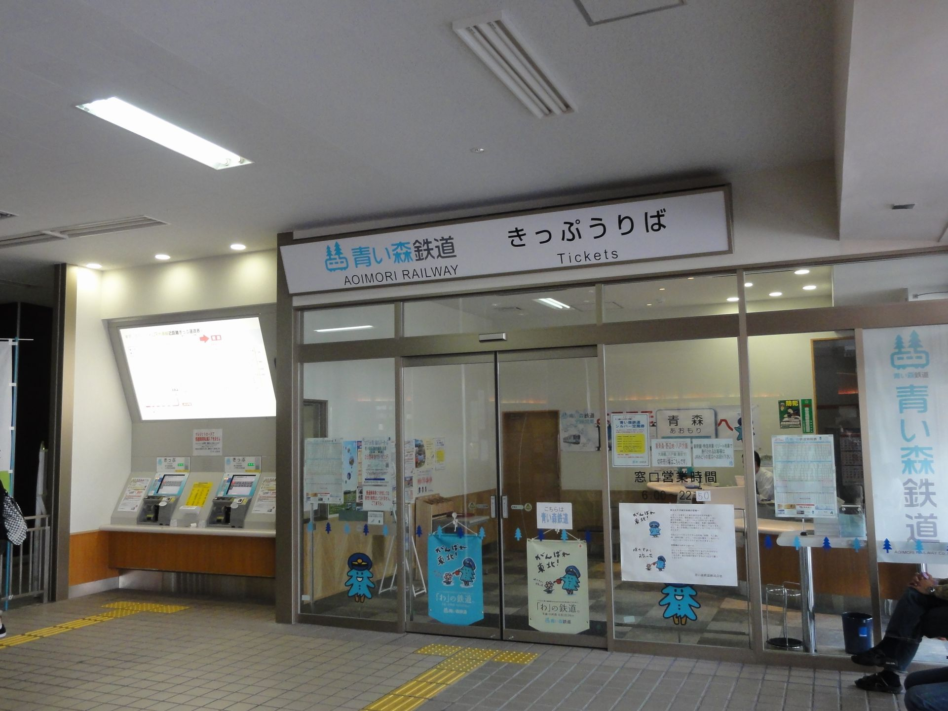 青い森鉄道青森駅きっぷうりば